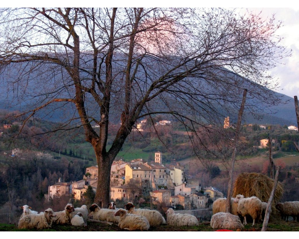 Tarano.